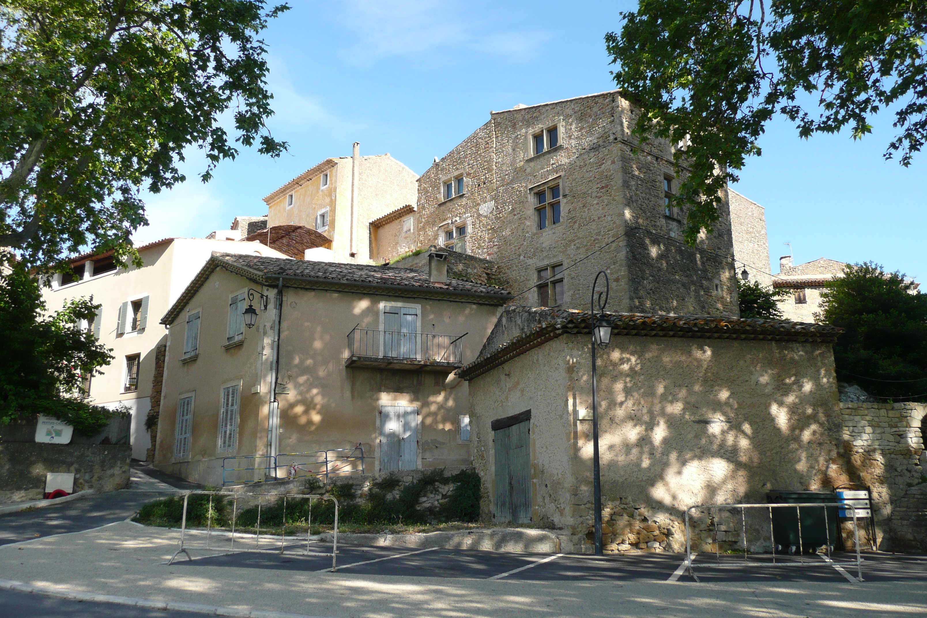 Vaugines.